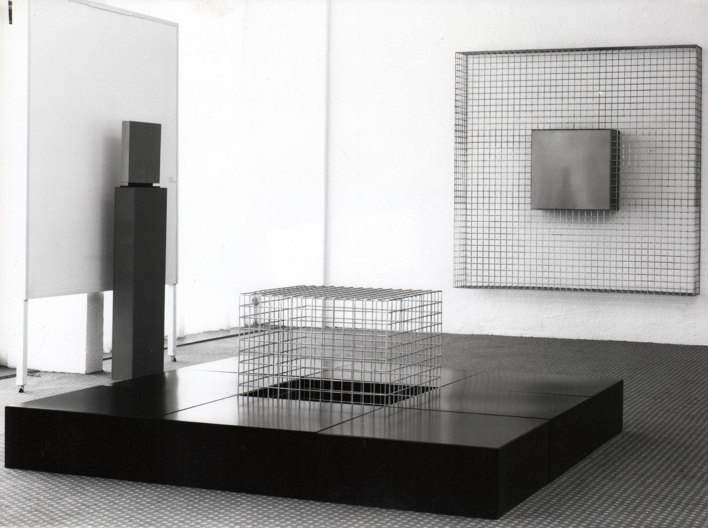 Galerie Van Laer, Anvers, 1992